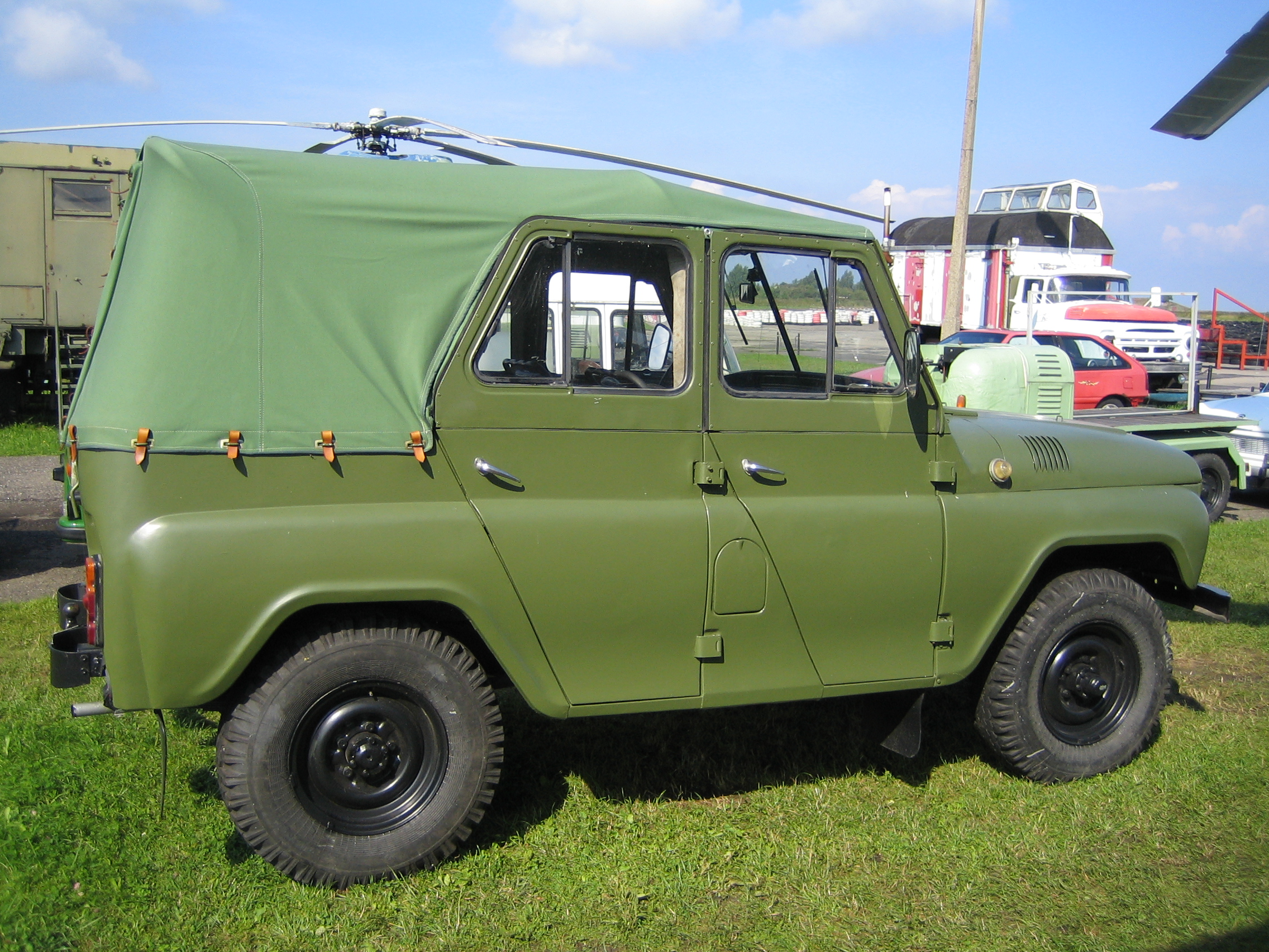 UAZ 469 in Peenemünde